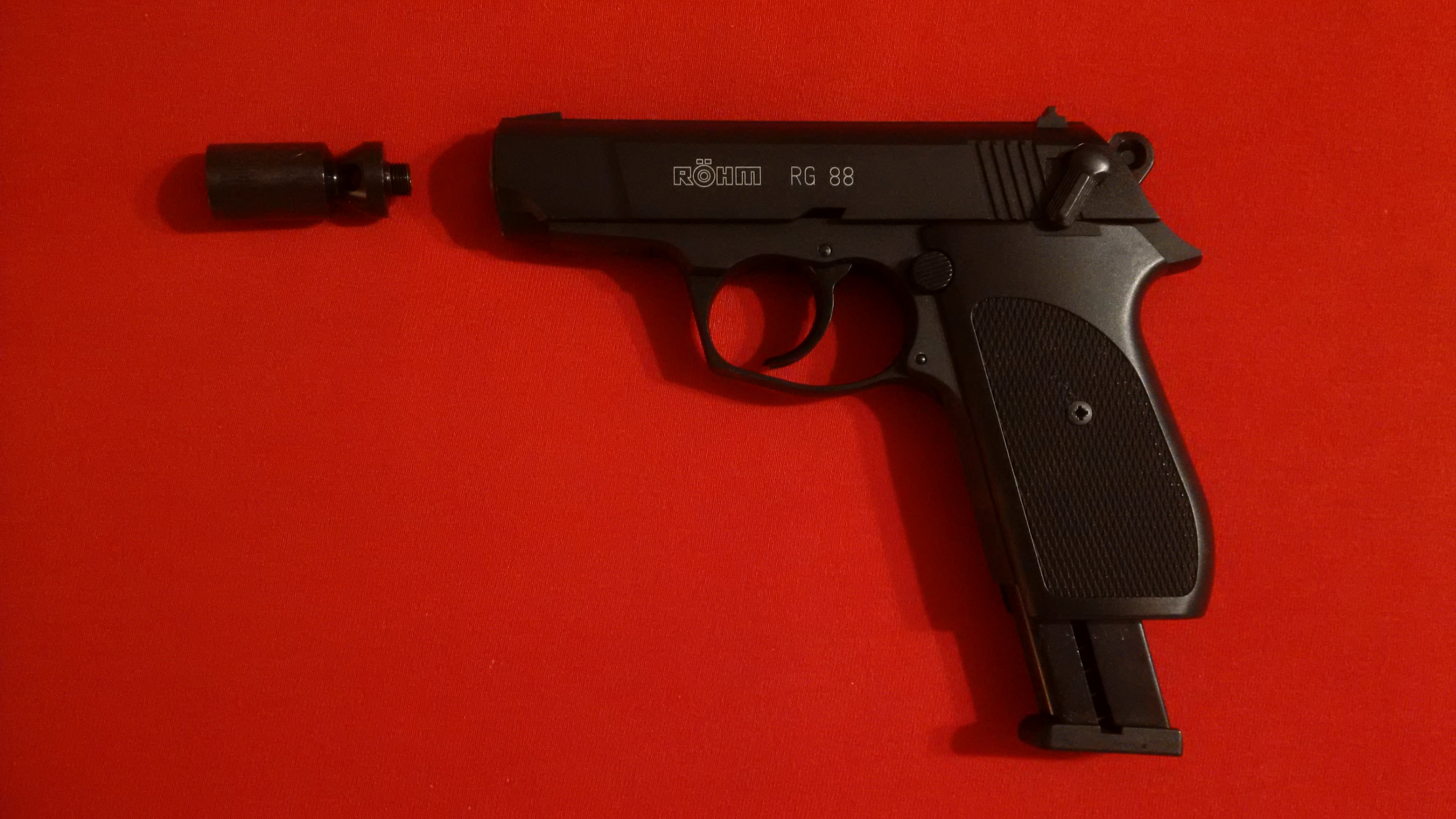 Röhm RG 88 mit nicht angeschraubtem Abschussbecher für Signalmittel und ausgefahrenem Magazin (7 Schuss).